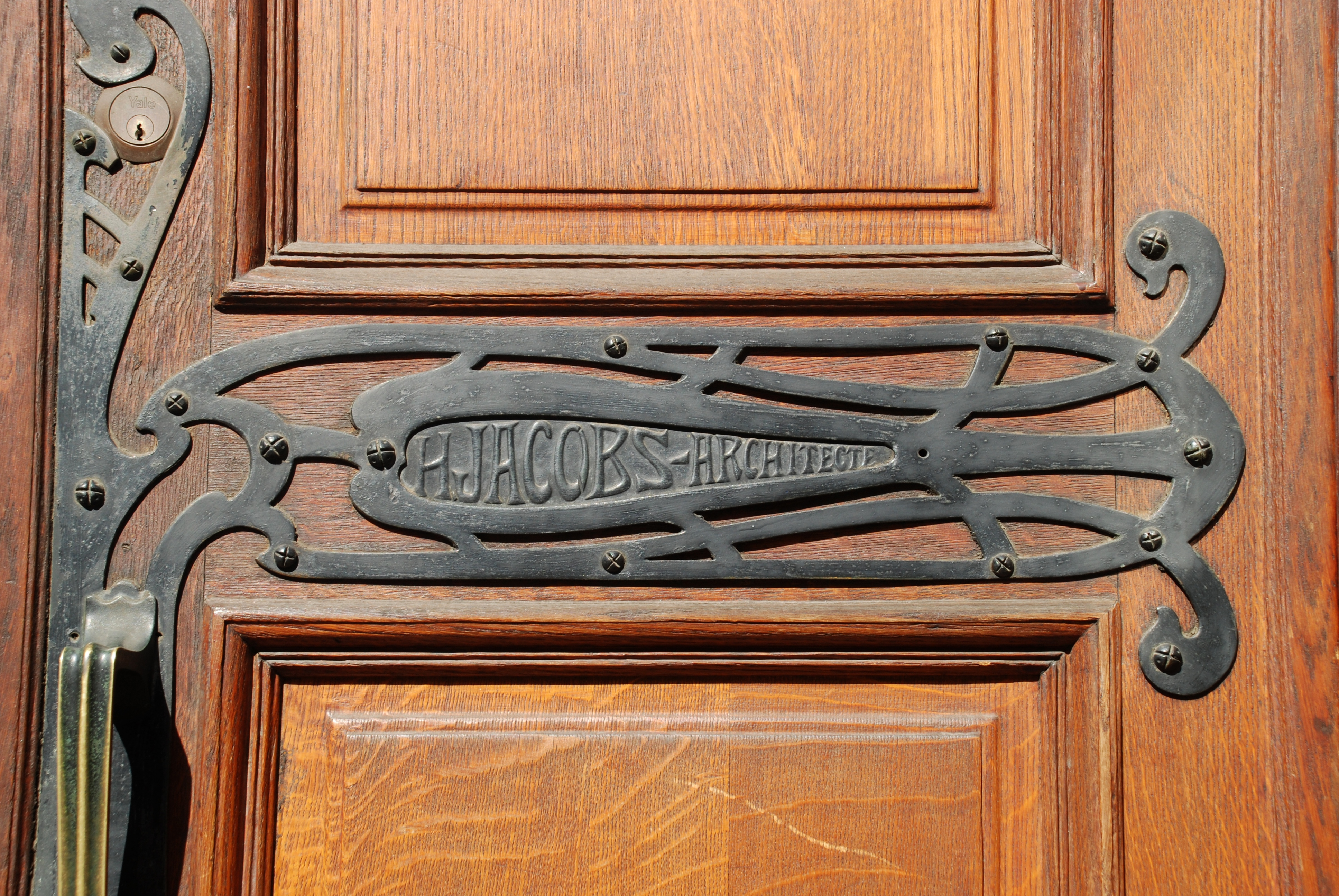 Belgique - Bruxelles - Maison Henri Jacobs